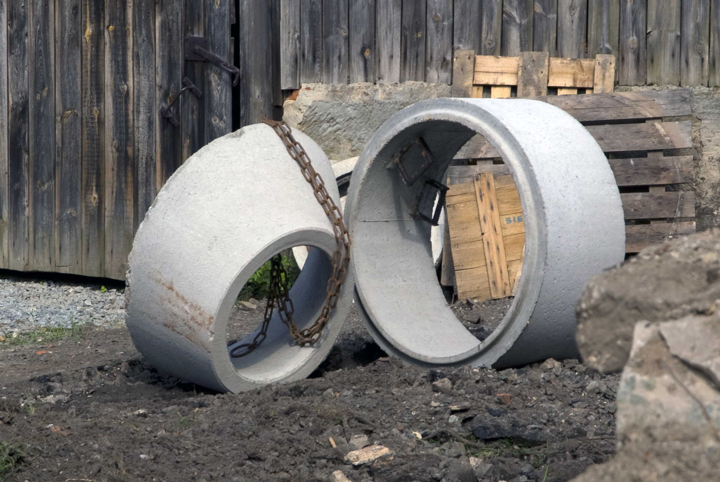 Betonfertigteile aus Schleuderbeton. Links ein Konus für einen Deckel, Rechts ein Segment mit Treteisen.